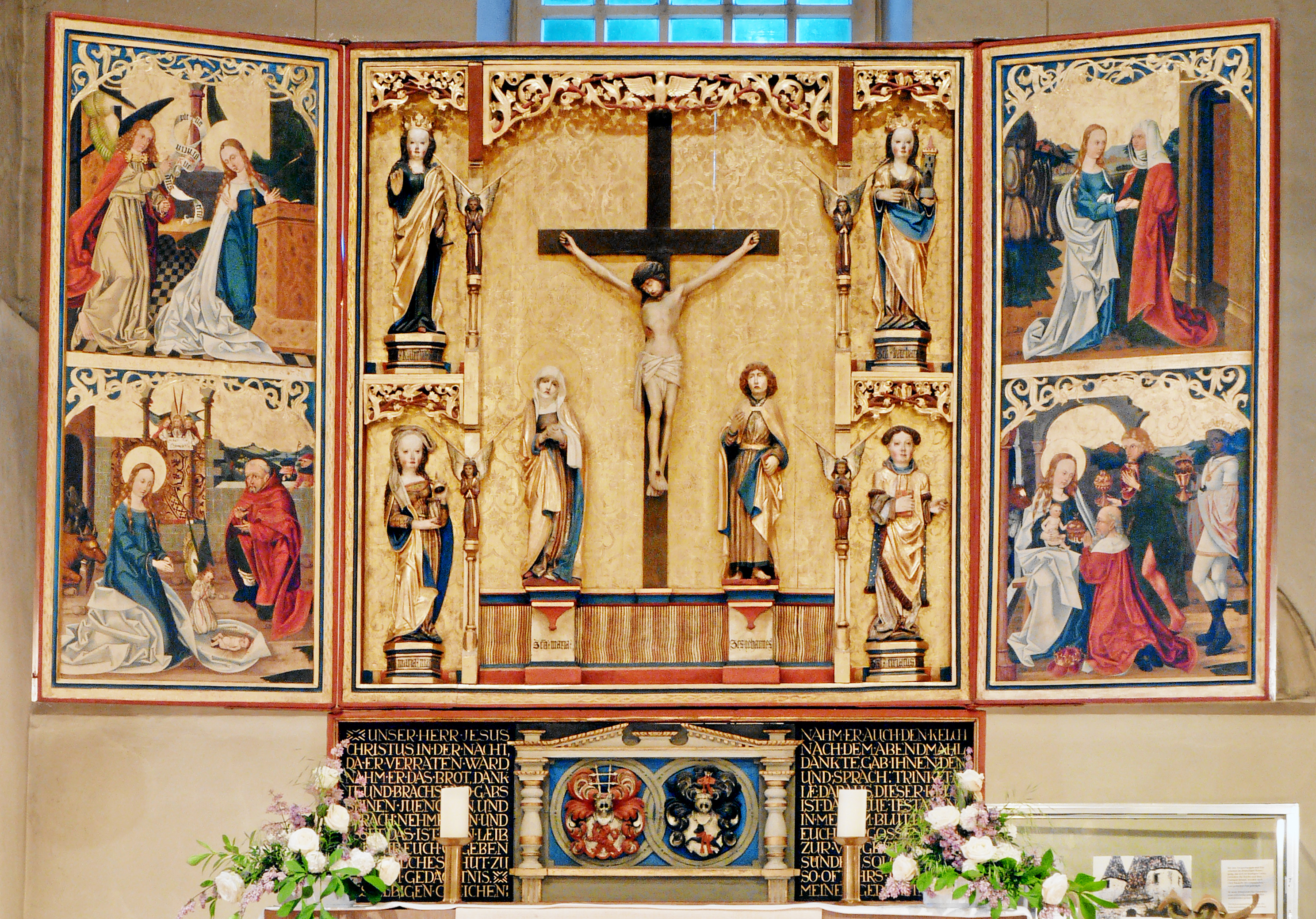 Hauptaltar der Klosterkirche Reinhausen, Gemeinde Gleichen, Südniedersachsen. Tafeln dat. 1498, Schnitzfiguren spätgotisch, Kreuzigungsgruppe jünger. Die Restaurierung aus einer Kanzelaltarwand erfolgte Ende des 19. Jahrhunderts